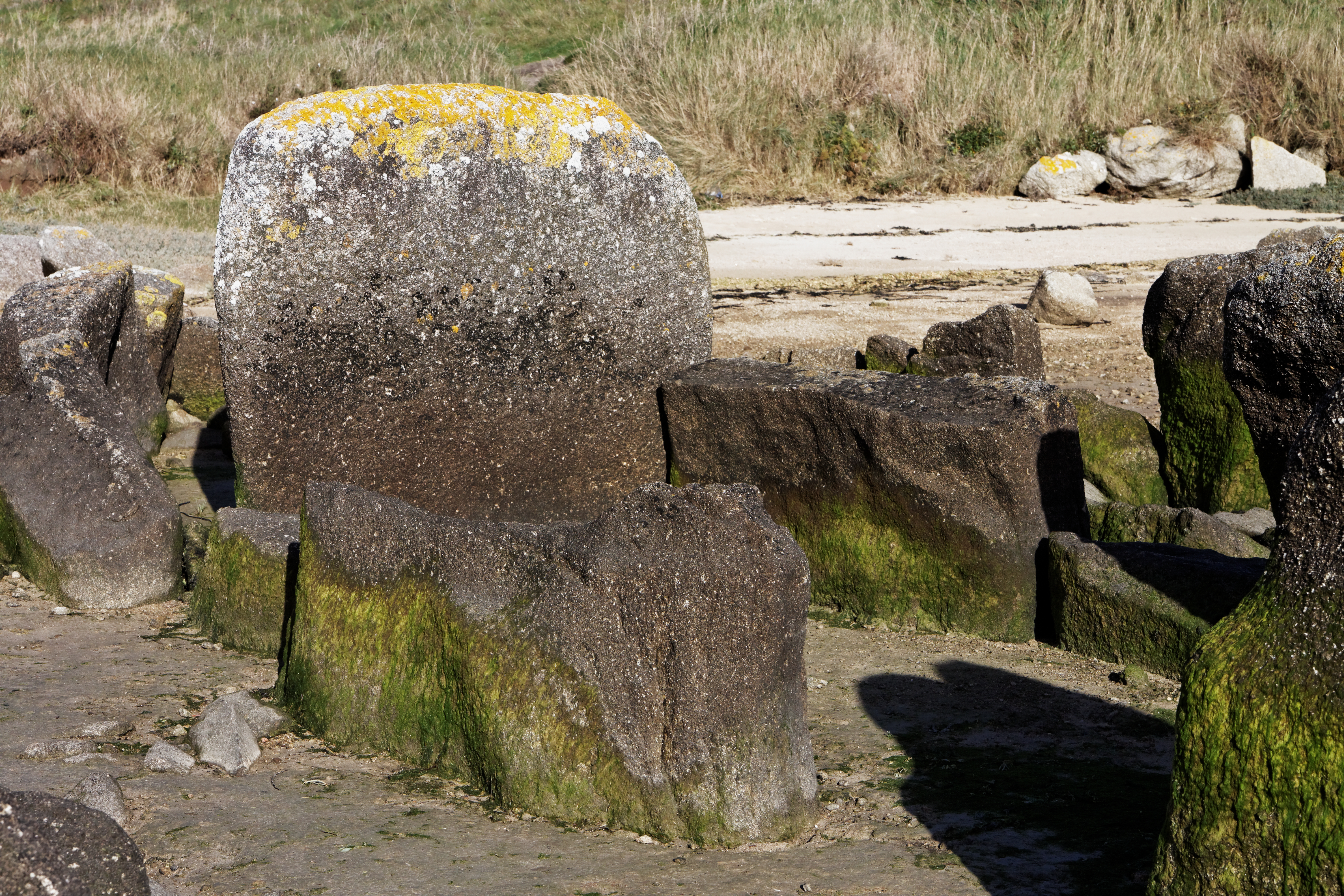 L'allée couverte de Guinirvit à Plouescat dans le Finistère. Elle a la particularité d'être couverte à marée haute et accessible à marée basse.